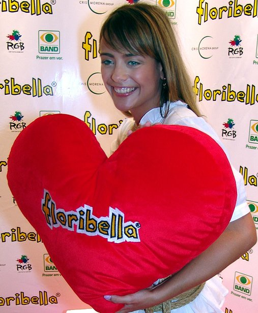 Brazilian actress Juliana Silveira.